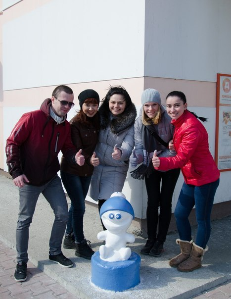 Снежик города Снежинска